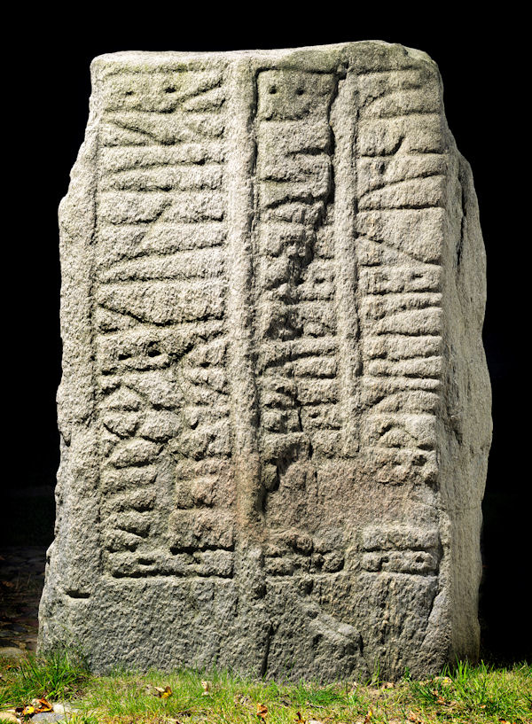 Foto af Roberto Fortuna 2012